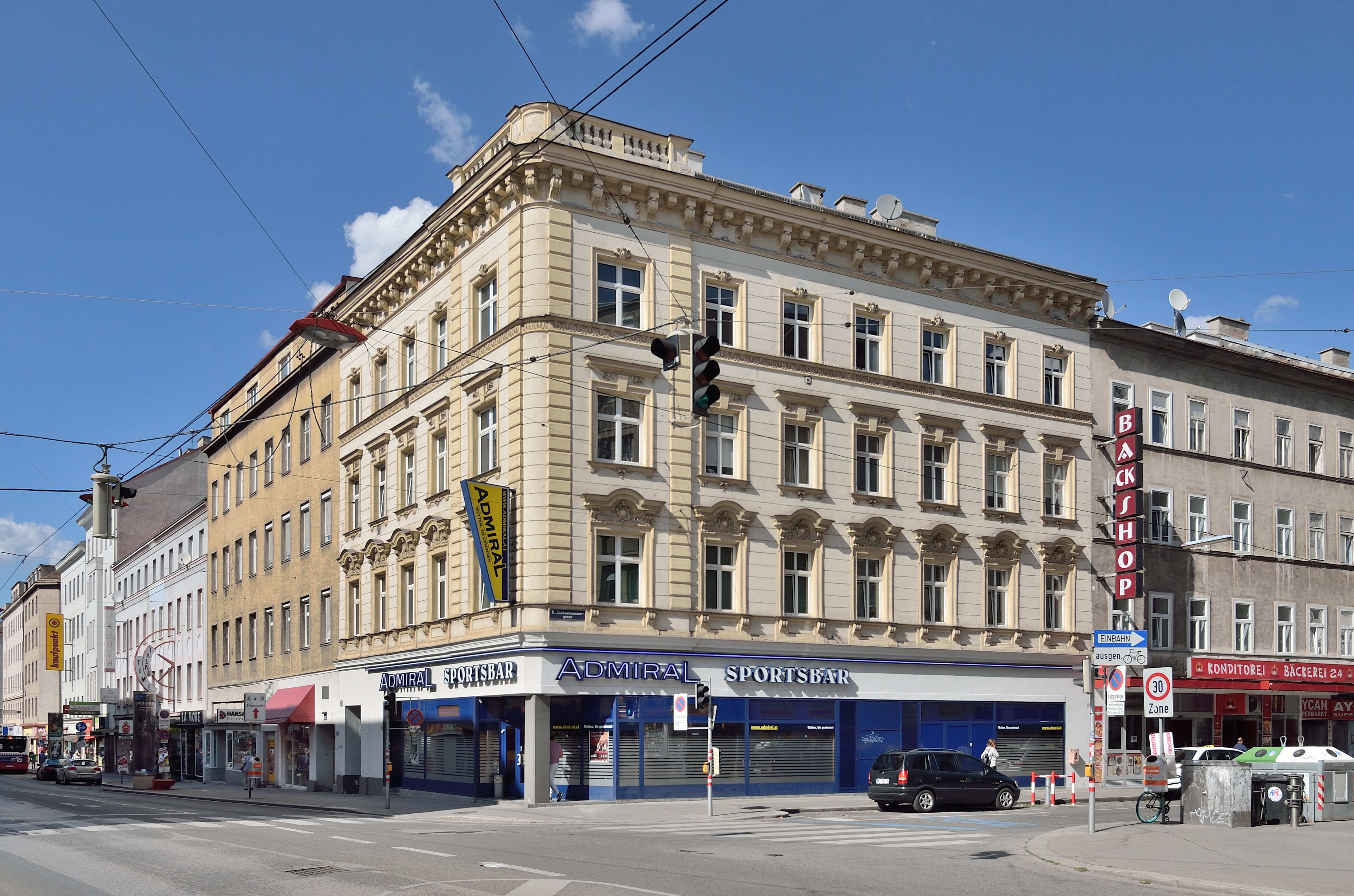 Wohnhaus Reinprechtsdorfer Straße 42 / Siebenbrunnengasse 52 in Margareten mit einem Admiral Sportwetten Wettbüro im Erdgeschoß. Gegenüber auf Reinprechtsdorfer Straße 40 und 38 sind noch 3 weitere Wettbüros.